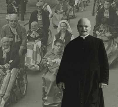 Monsignor Luigi Novarese, fondatore del Centro Volontari della Sofferenza